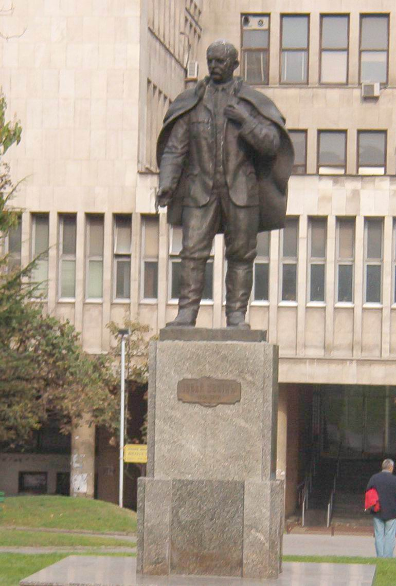 Јован Цвијић споменик у Студентском парку, Београд Fotografisao Goldfinger. U javnoj upotrebi!